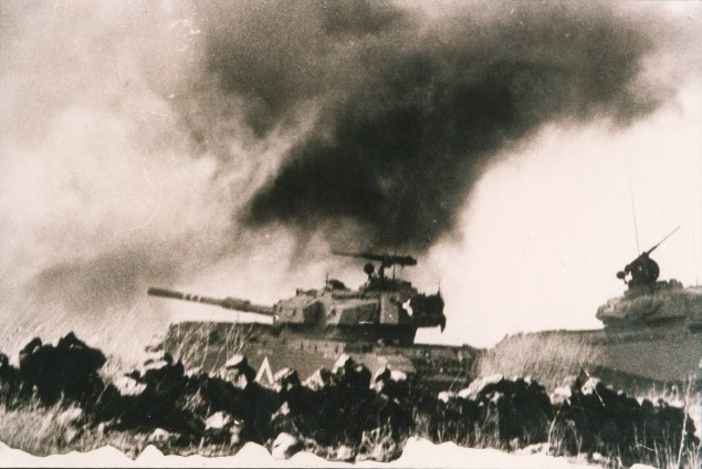 הקרב על עמק הבכא